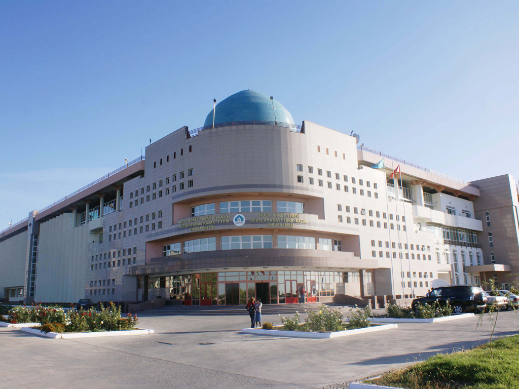 ХҚТУ филология